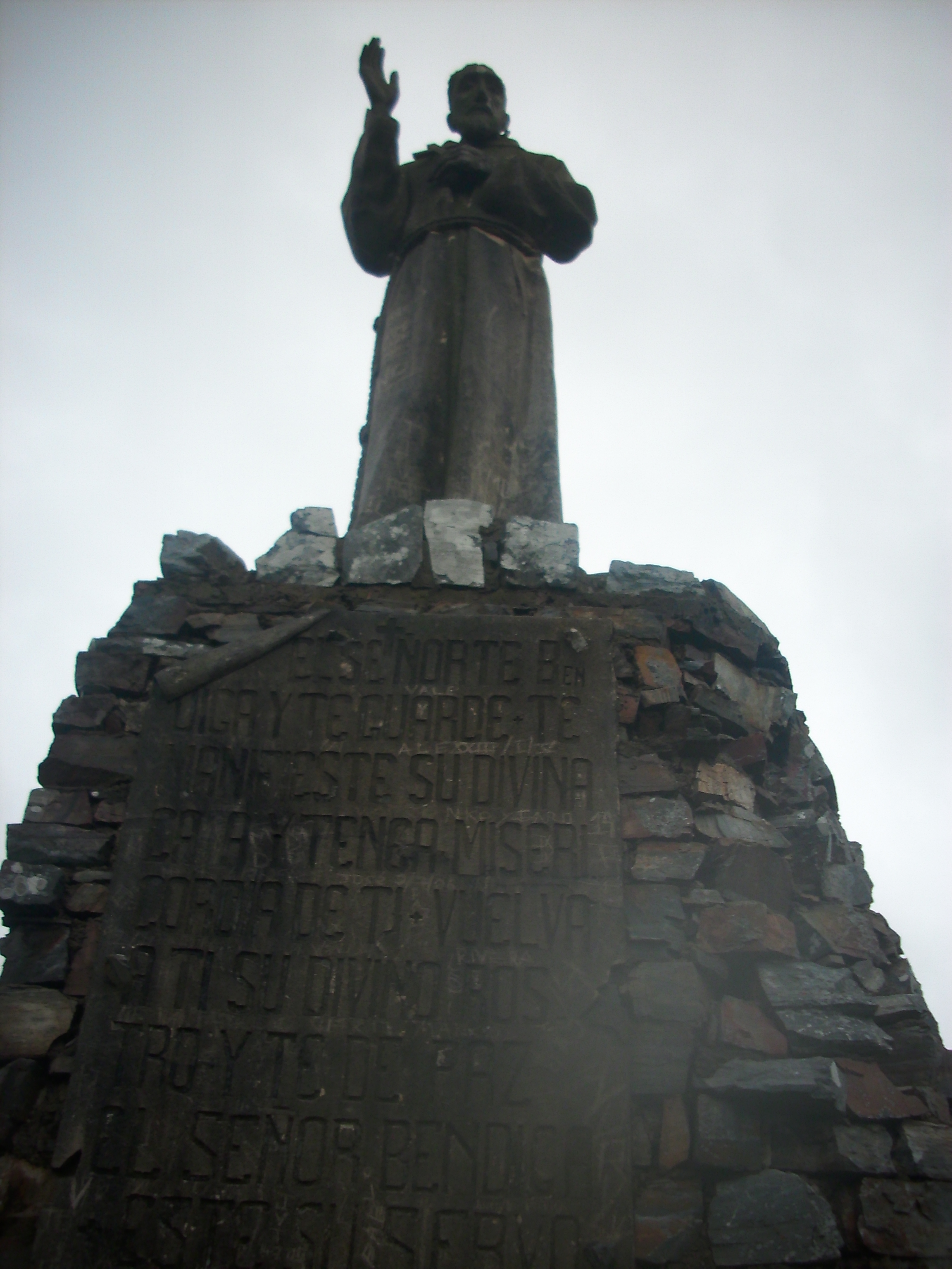 San Francisco. Ubicada en el departamento de Maldonado